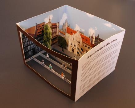 Braunschweiger Gückkästchen von schräg oben. Ansicht des Burgplatzes.